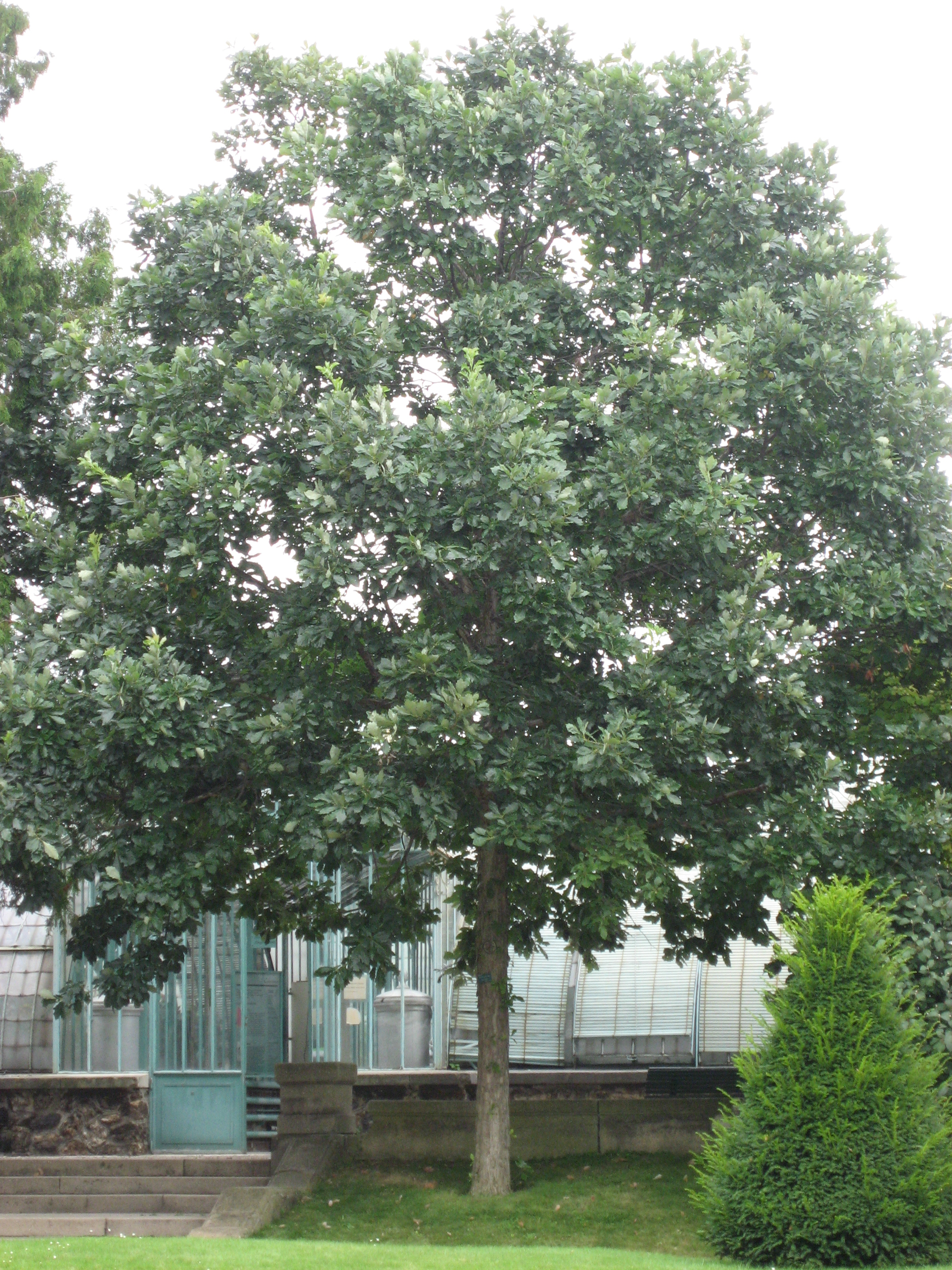 Quercus bicolor in Serres d'Auteuil Map: 48° 50' 49" N 2° 15' 8" E